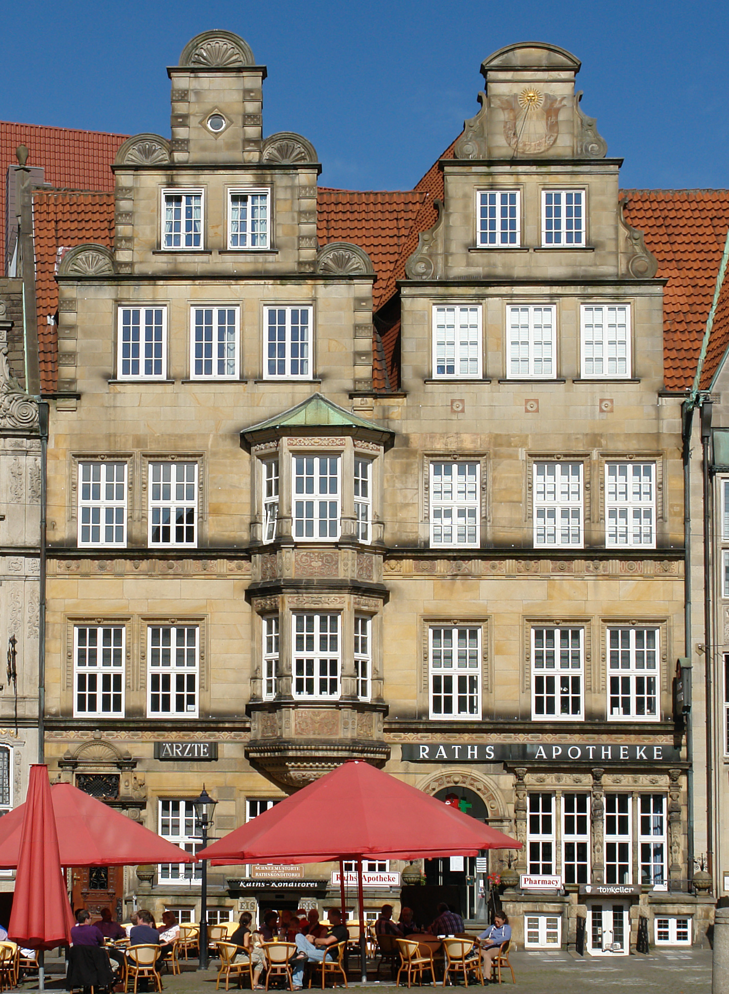 Raths-Apotheke in Bremen, Am Markt 11.Das abgebildete Objekt ist ein geschütztes Kulturdenkmal in der Freien Hansestadt Bremen, mit der Nr. 0070 beim Landesamt für Denkmalpflege registriert.